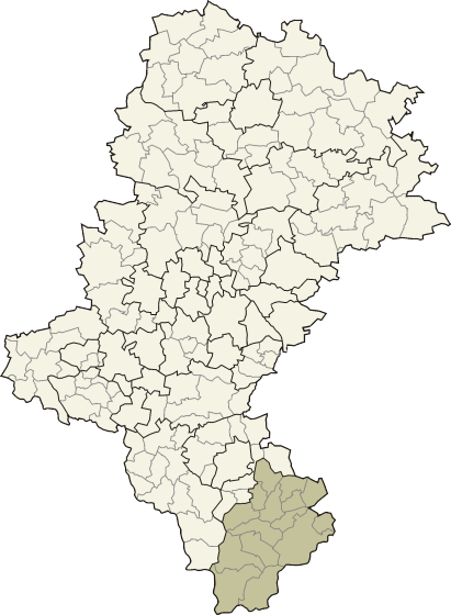 Powiat żywiecki w województwie śląskim